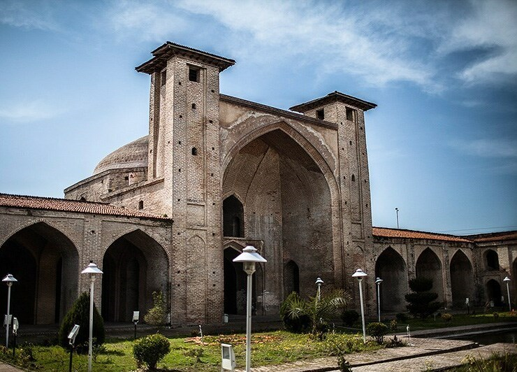 مازِرونی: فرح آباد ساری